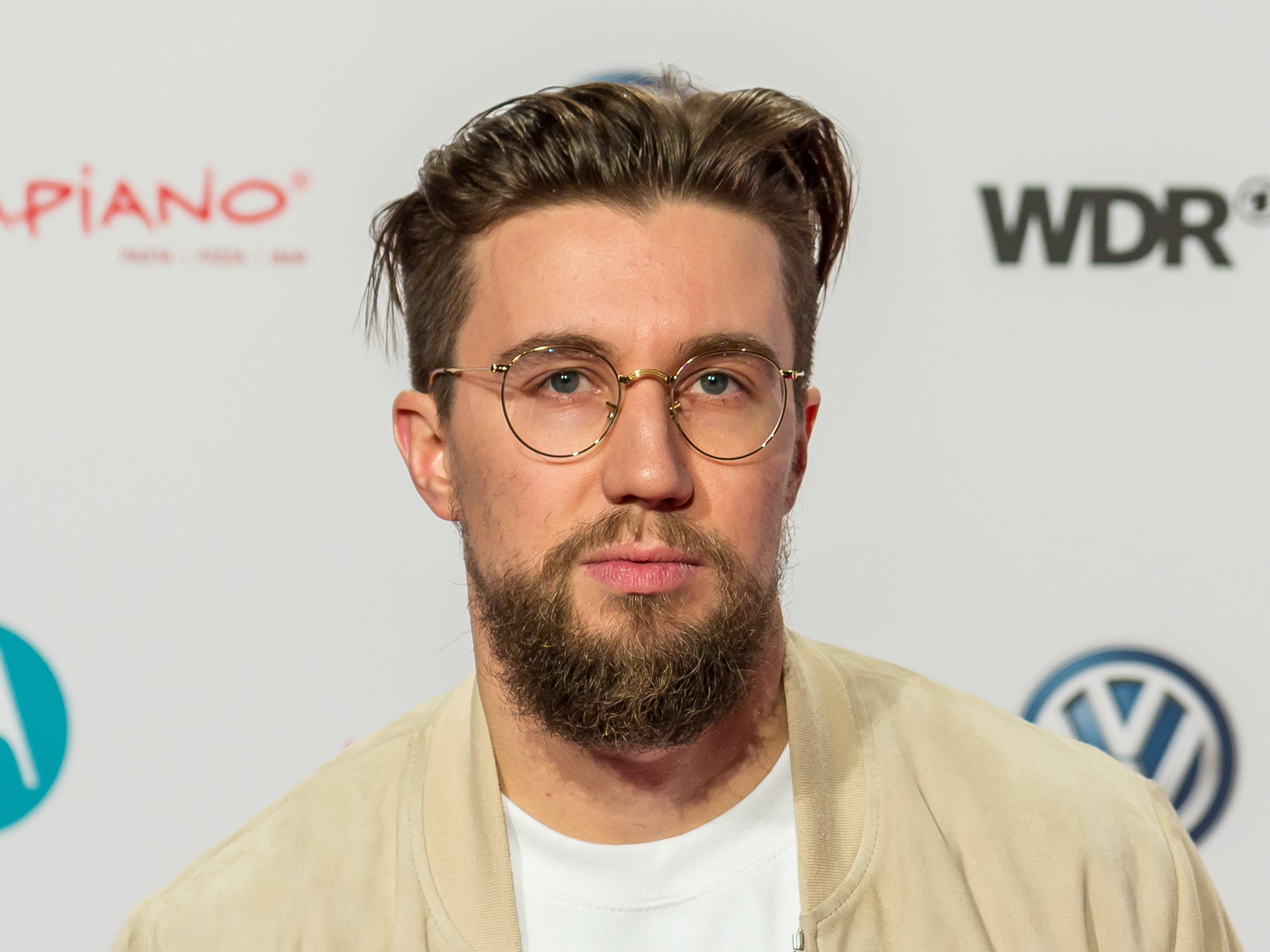 1LIVE Krone 2016 - 1700 - Roter Teppich - Prinz Pi